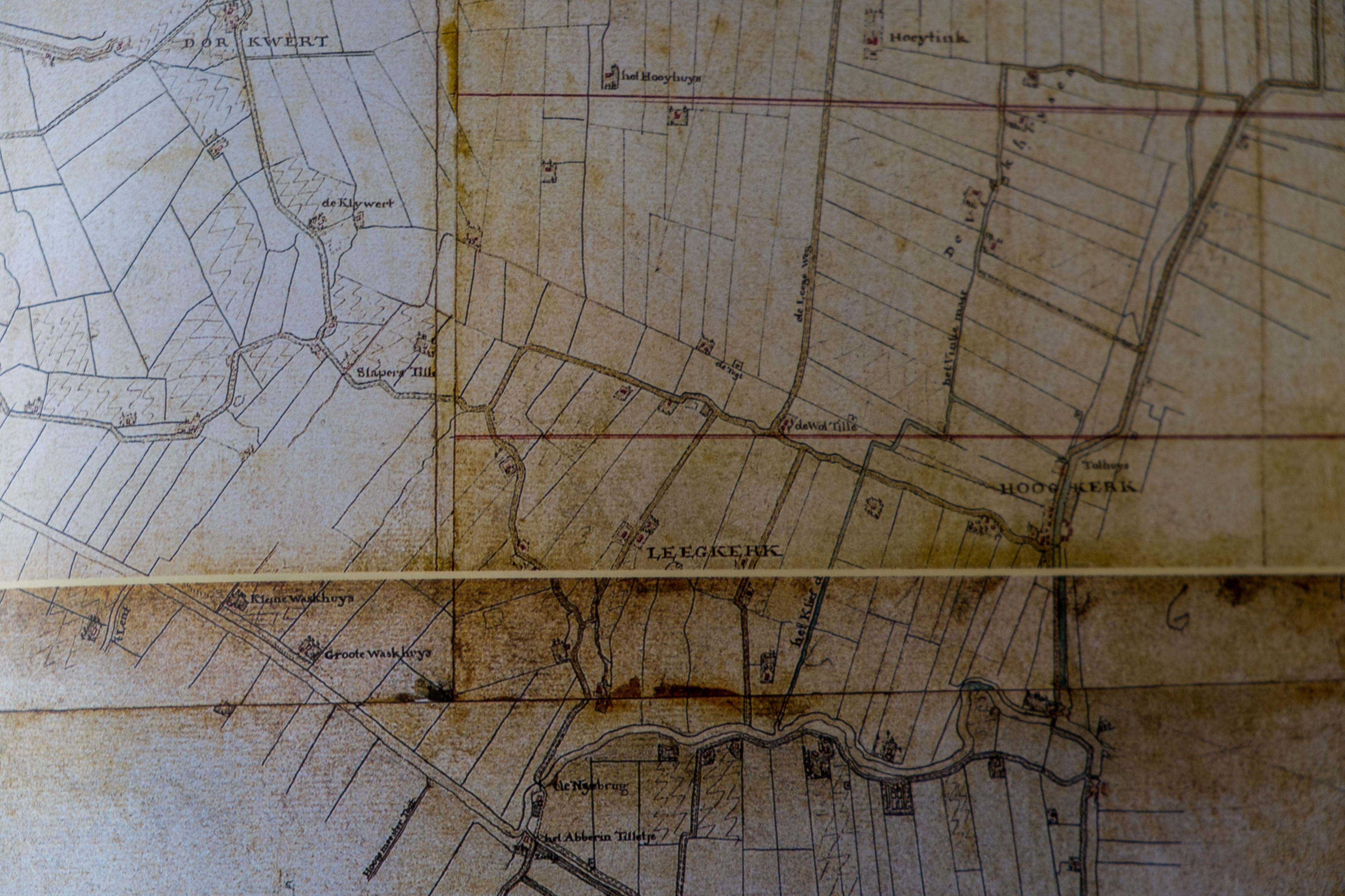 Kaart van Leegkerk en omgeving van Johan Heinrich Hottinger uit ca. 1792 tot 1794